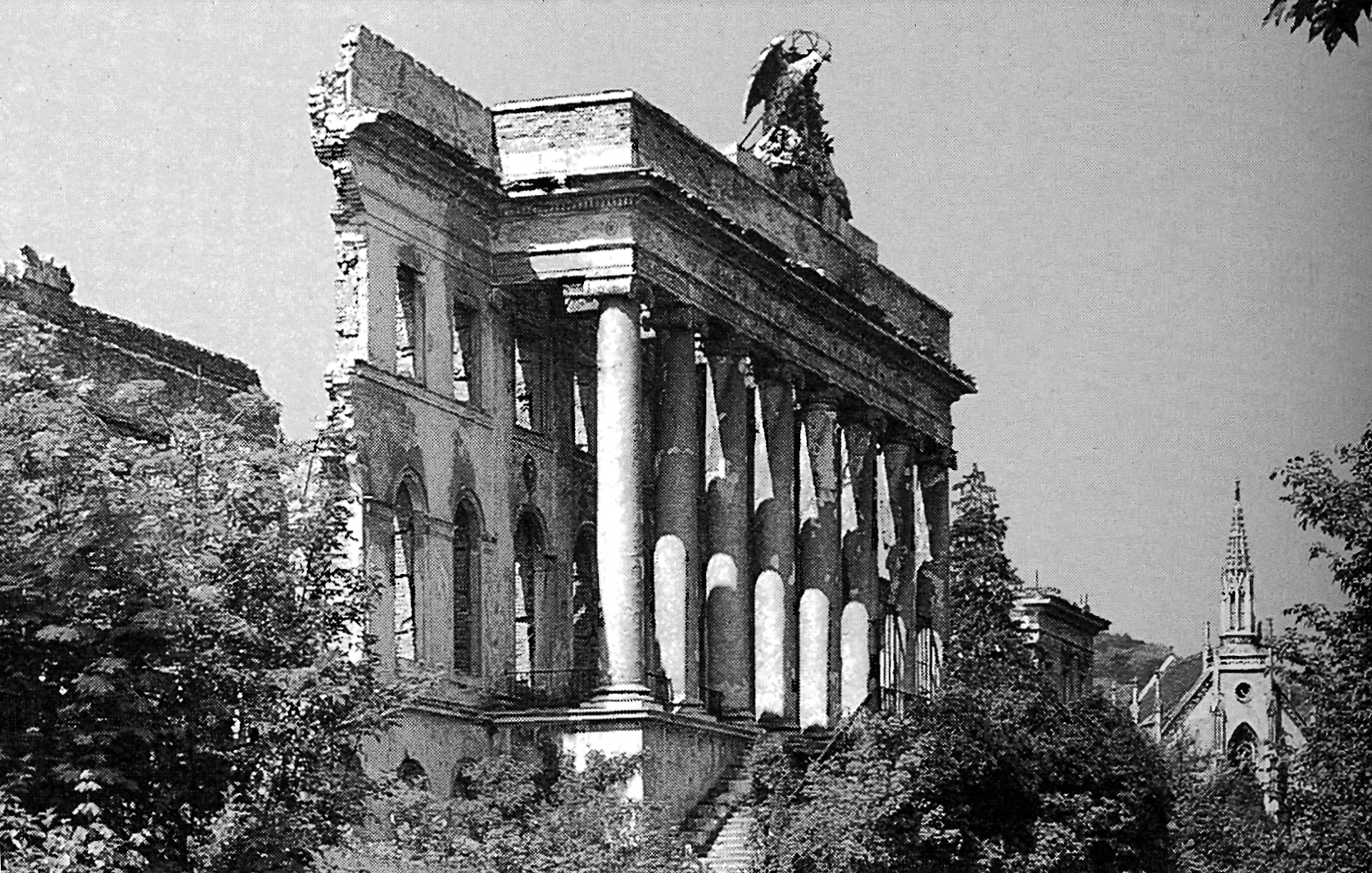 Reste von Schloss Weilburg, Baden bei Wien, vor Sprengung 1964